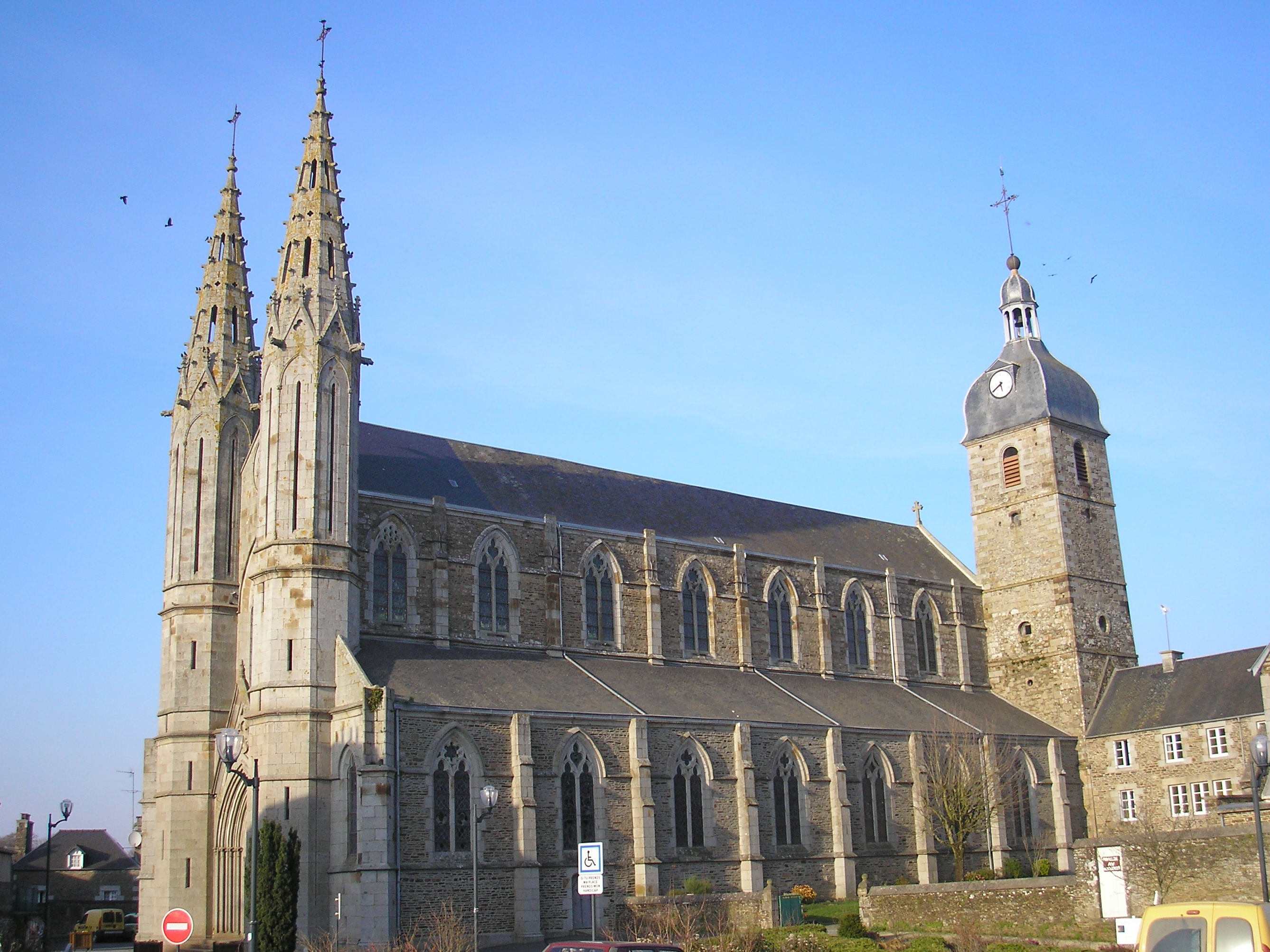 Saint-James (Normandie, France). L'église Saint-Jacques.